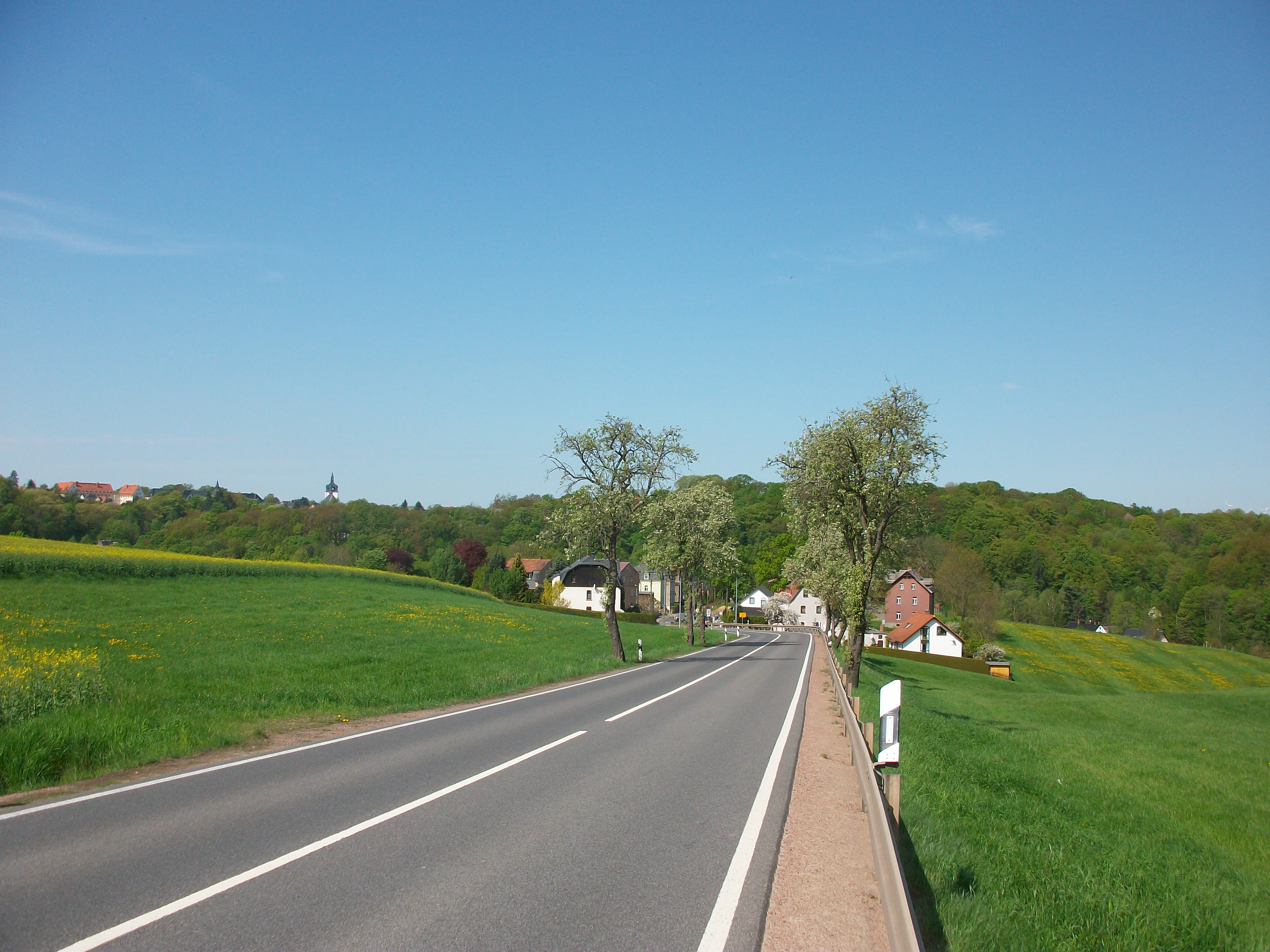 Mittweida-Neudörfchen, Ortsteingang